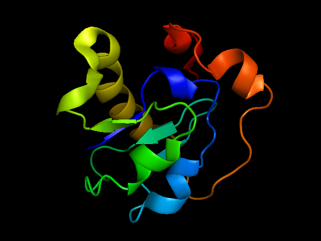 Ferredoxin Structure